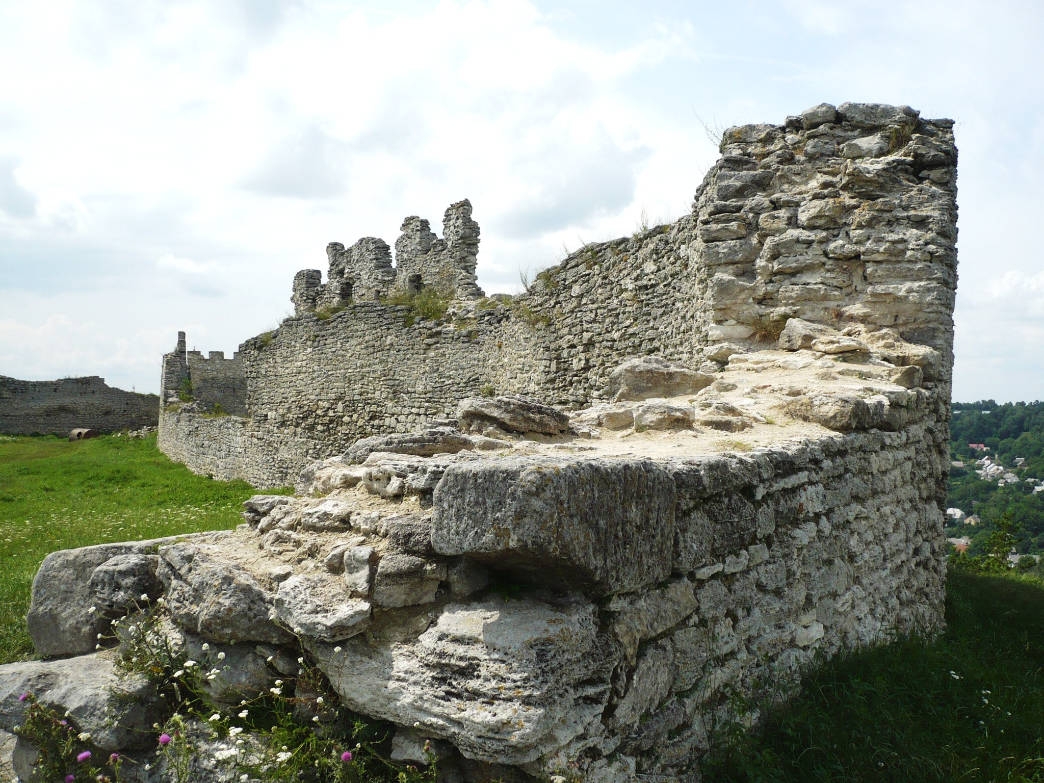 Zamek w Krzemieńcu